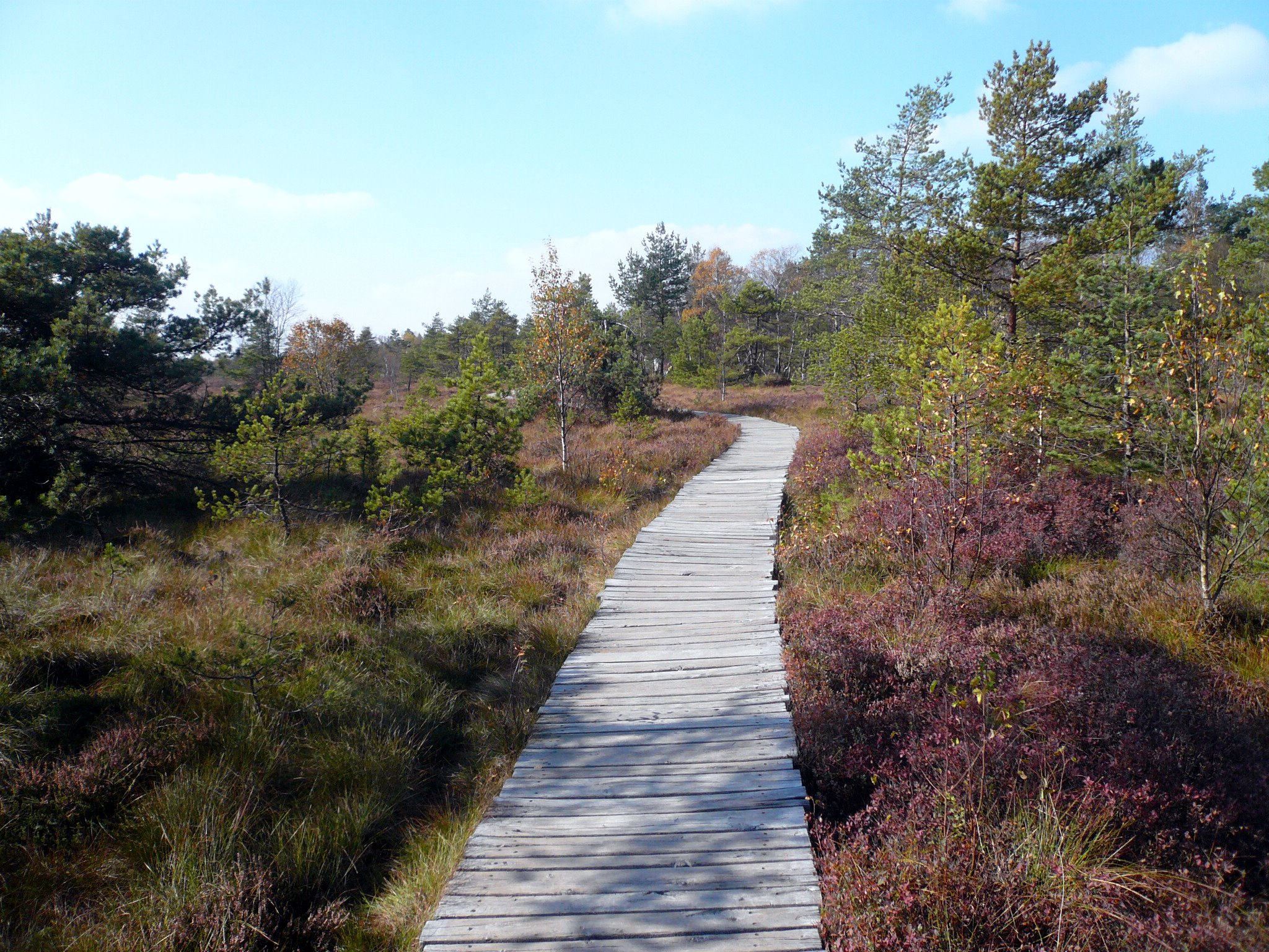 Schwarzes Moor